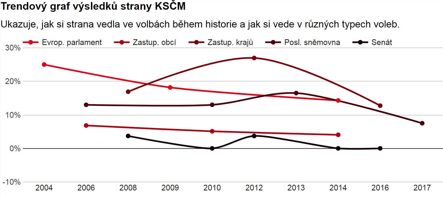 KSČM - Výsledky voleb, získané mandáty, trendy od 2004 do 2017. Poslanecká sněmovna, senát, kraje, obce, evropský parlament.